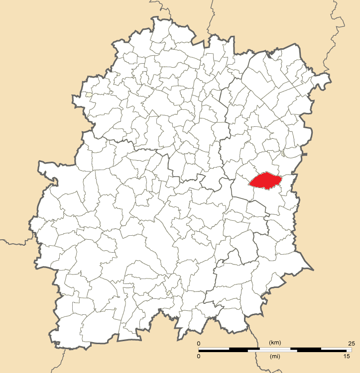 Carte de position de Chevannes en Essonne (91)